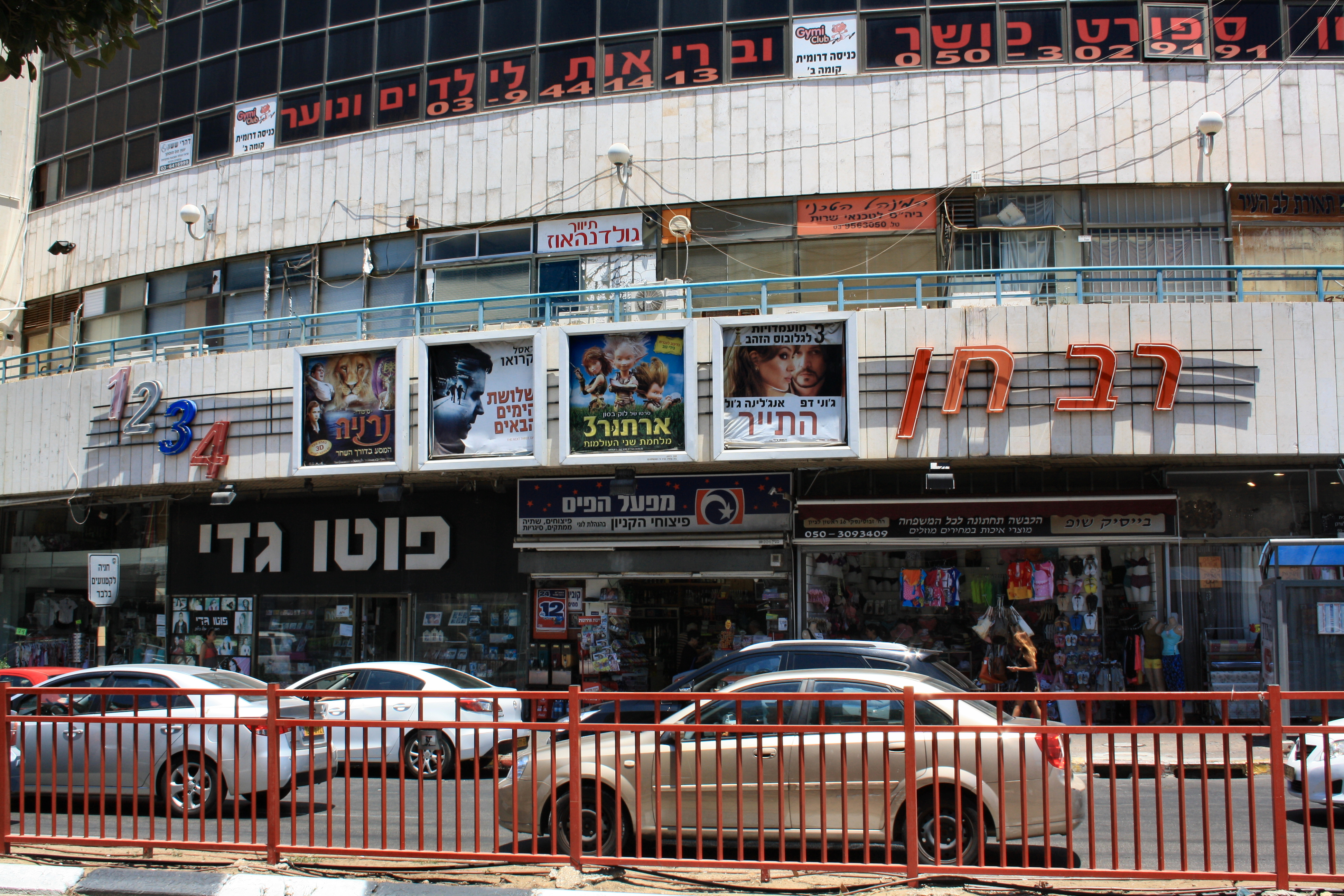 קניון לב העיר ("השקם"). החזית לרחוב ז'בוטינסקי. בקניון שכן קולנוע "רב חן", שנסגר לאחר פתיחתם של אולמות קולנוע חדשים במערב העיר. הכרזות של סרטי ינואר 2011 עודן תלויות במקום (יוני, 2013).